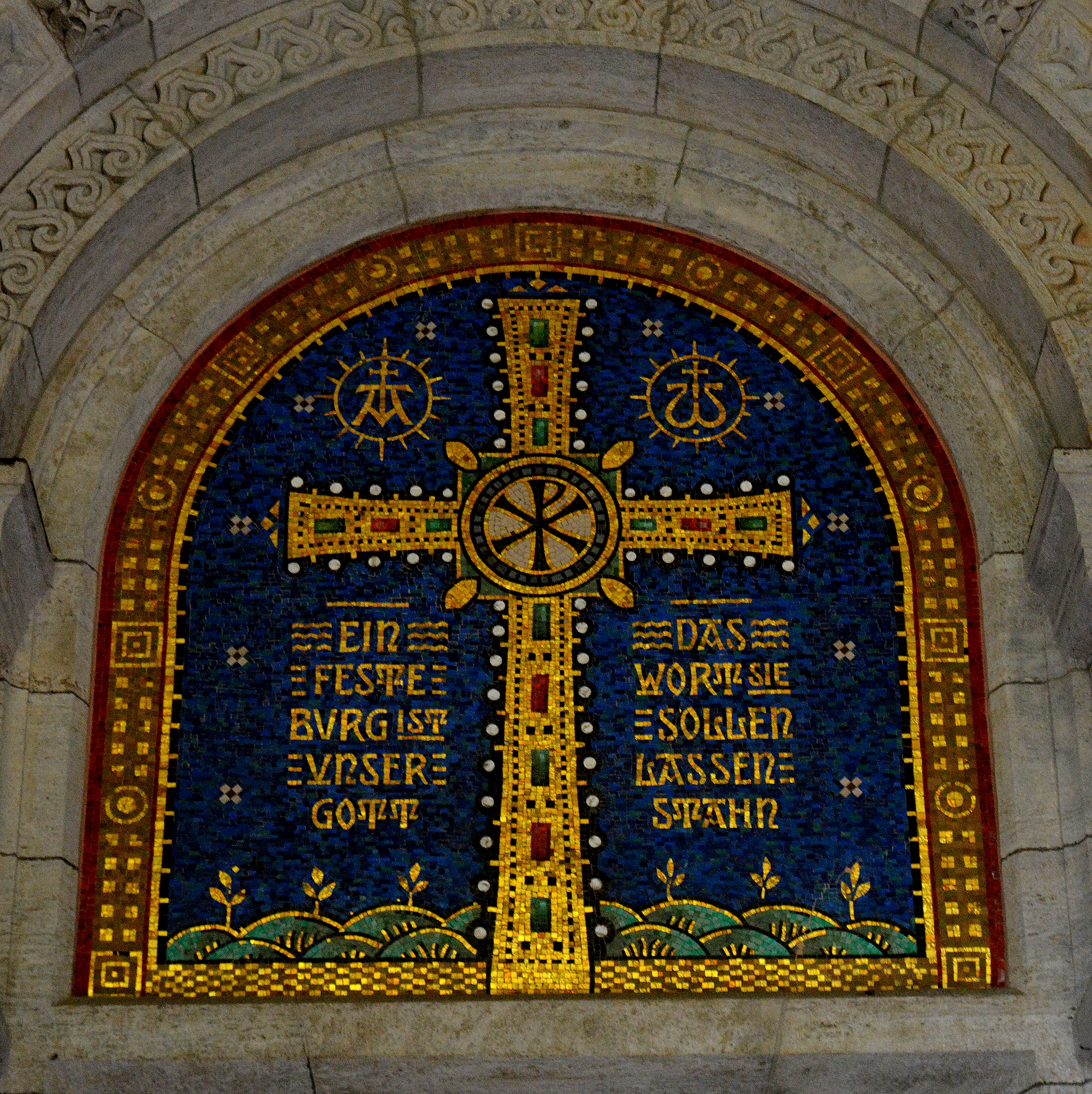 Wiesbaden, Lutherkirche, Mosaik-Darstellung Tympanon